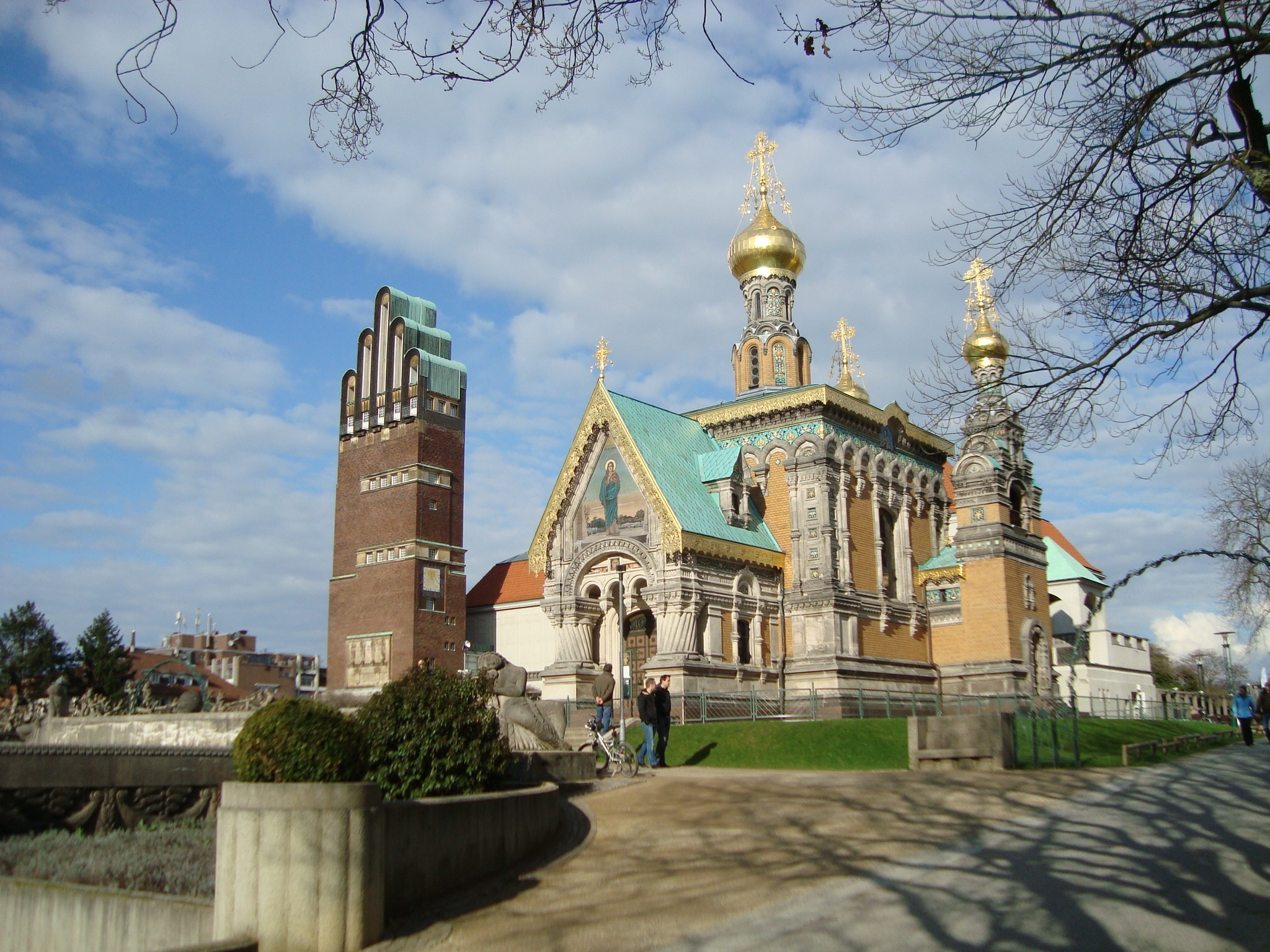 Die russiese kapel en die huwelikstoring by Mathildenhöhe